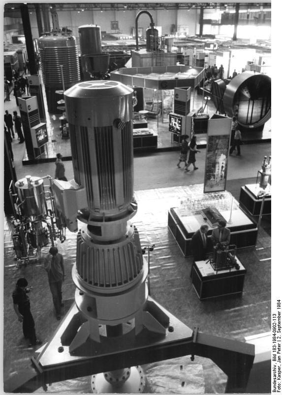 Leipzig, Herbstmesse, Chemieanlagenbau ADN-ZB Kasper 2.9.84 Leipzig: Herbstmesse 84-In der Halle 6 offeriert der VEB Chemieanlagenbaukombinat Leipzig-Grimma sein Exportangebot zu den Schwerpunkten Erdölverarbeitung, Kohleveredelung, Lebensmitteltechnologie und Tieftemperaturtechnik. Das Erzeugnisangebot wird durch ein interessantes Fachvortragsprogramm bereichtert.